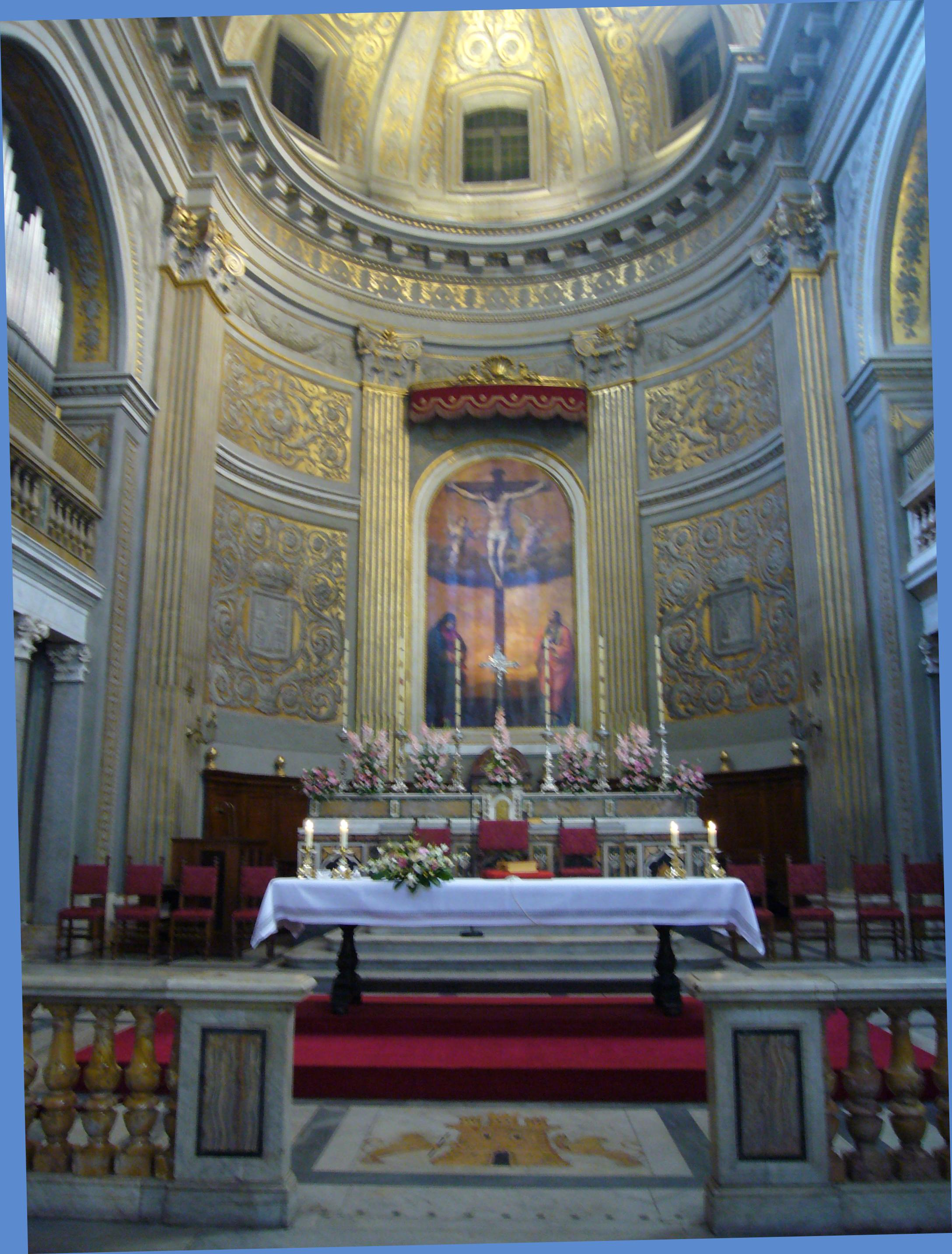 Roma, Santa Maria in Monserrato: abside